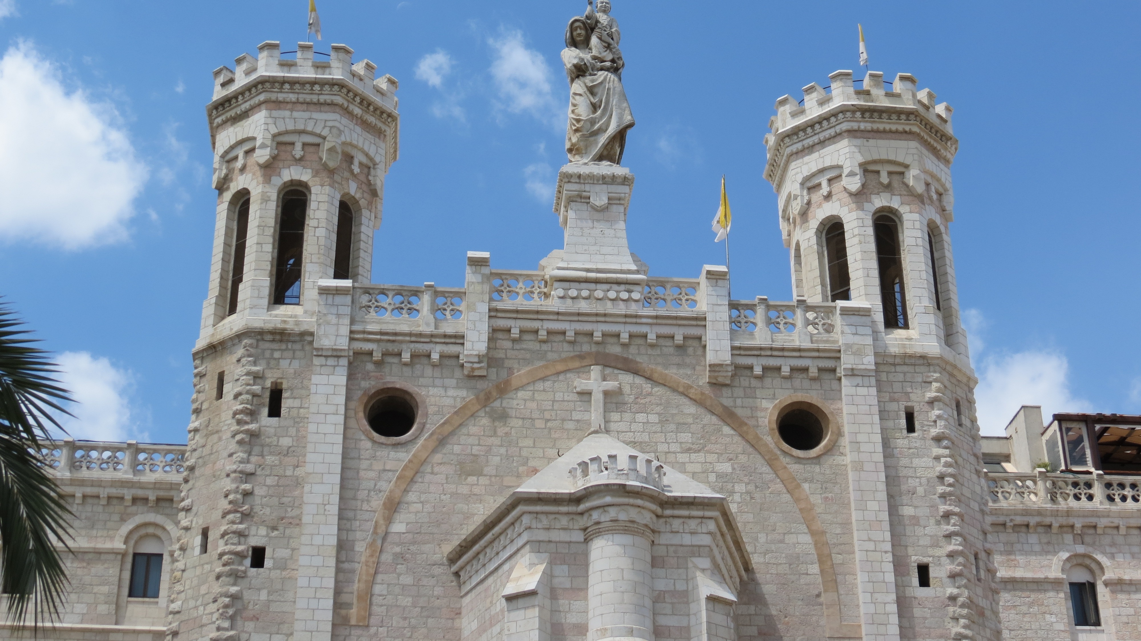 Notre Dame de France Hospice, Jerusalem, Israel אכסניית נטרה דם ירושלים